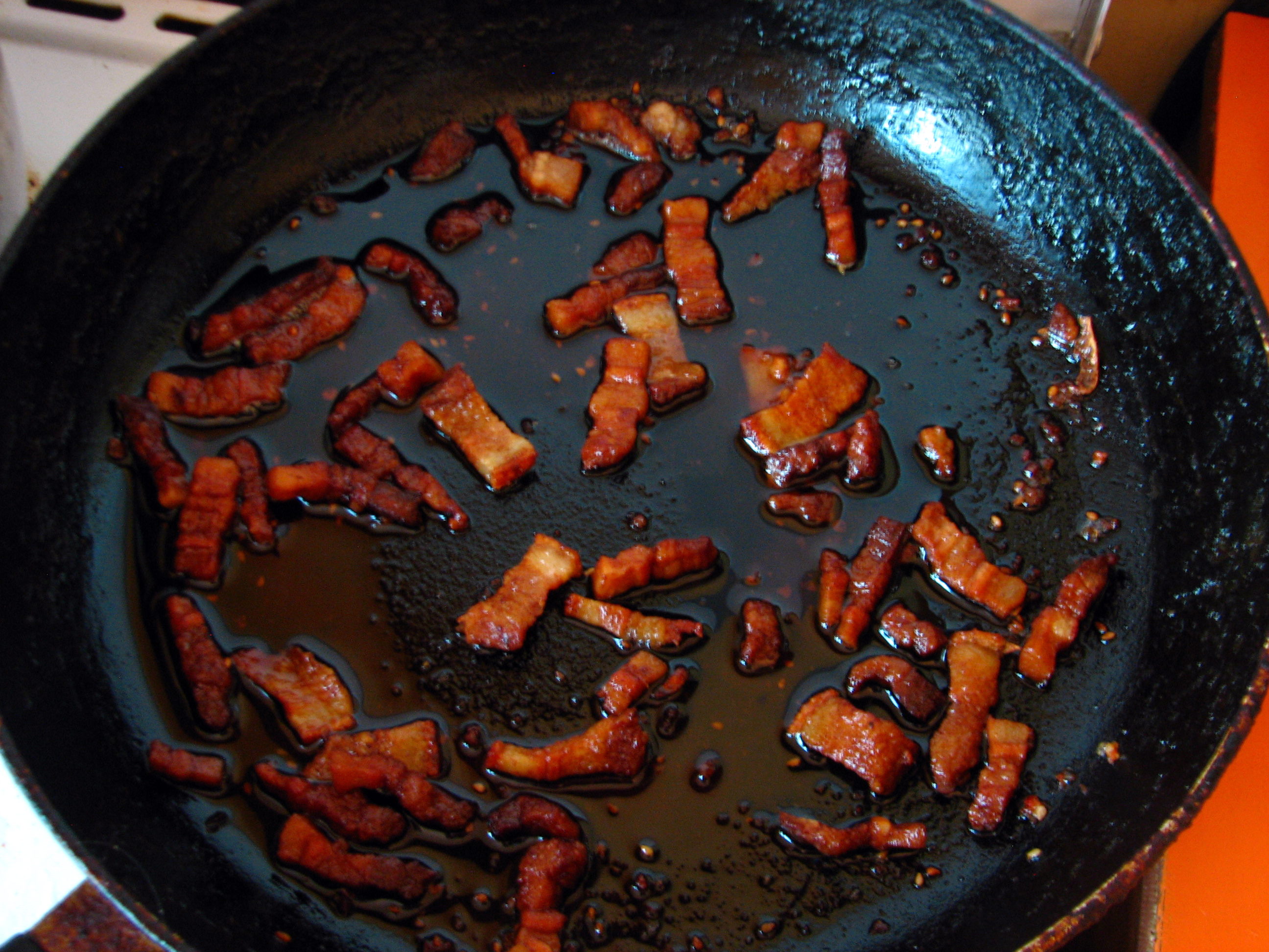 Беларуская (тарашкевіца): Шкваркі на патэльні «ва ўласным соку»